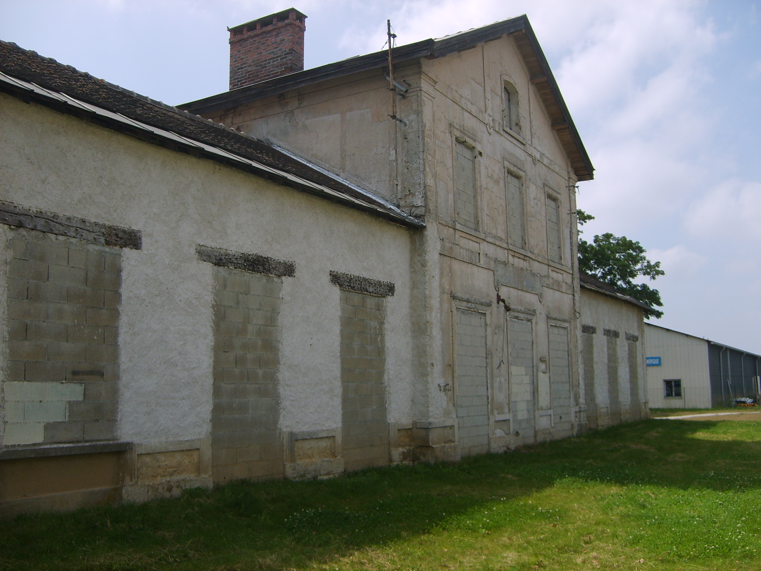 Zncienne Gare de Brie-Comte-Robert